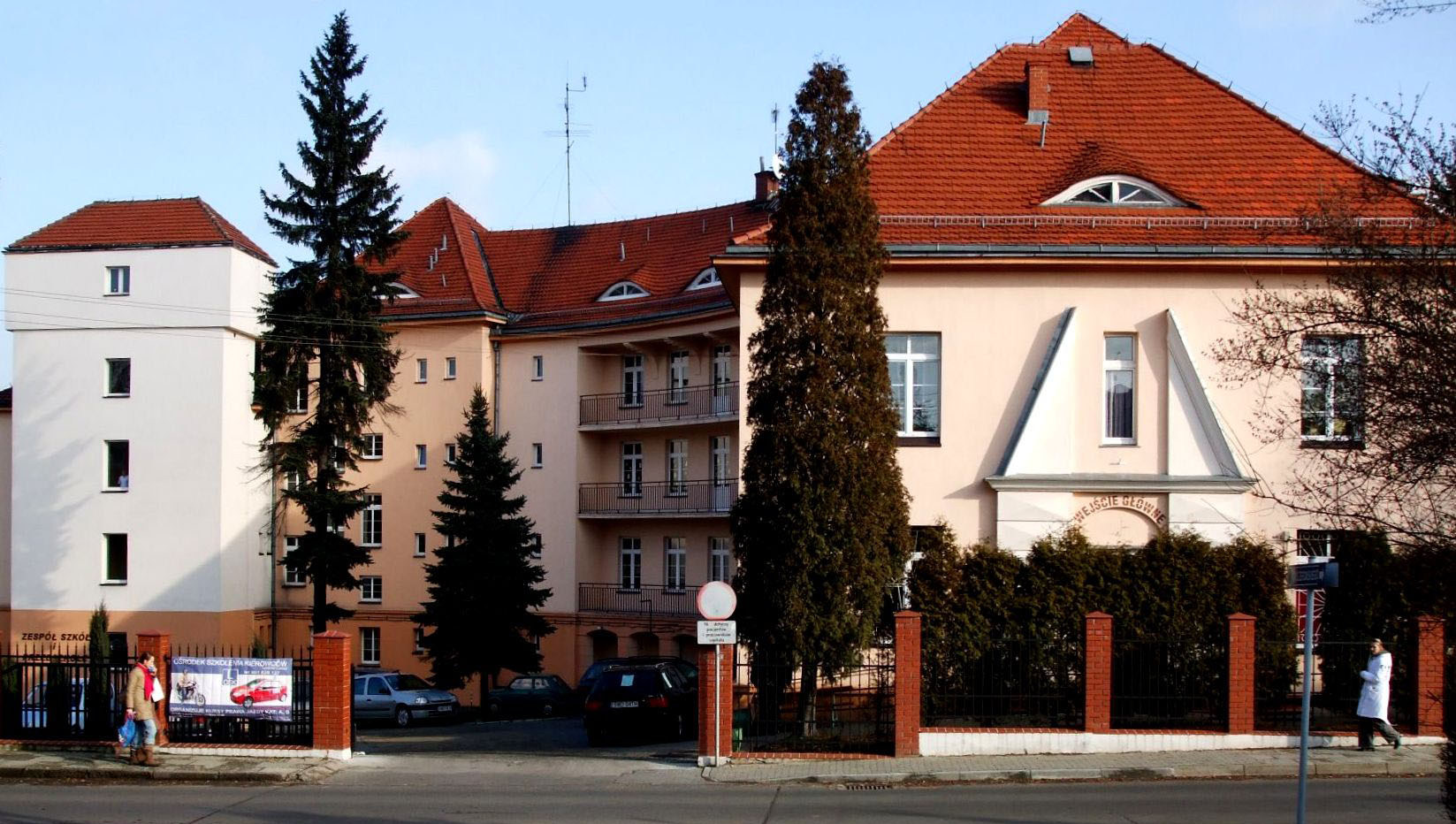 Wojewódzki Szpital Rehabilitacyjny dla Dzieci (Jastrzębie Zdrój).